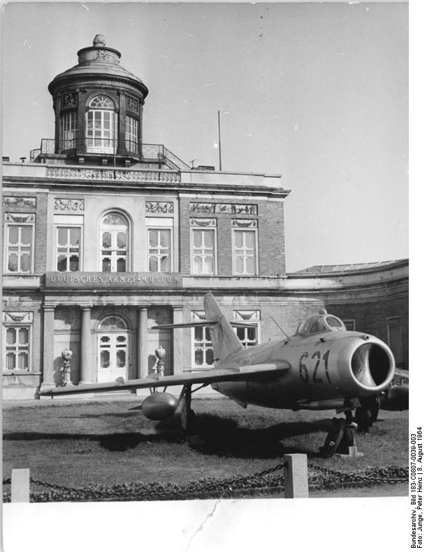 Zentralbild-Junge 8.8.1964 Deutsches Armeemuseum in Potsdam Viele Tausend Besucher haben sich seit dem 1. März 1961, dem Tage der Eröffnung des Deutschen Armeemuseums in Potsdam bei Berlin (Deutsche Demokratische Republik), mit den fortschrittlichen militärischen und revolutionären Traditionen des deutschen Volkes, besonders der deutschen Arbeiterklasse vertraut gemacht. Daneben gibt das Museum einen umfassenden Einblick in das Leben und die Ausbildung der Angehörigen der Nationalen Volksarmee. UBz: Blick auf das Deutsche Armeemuseum, den ehemaligen Marmorpalast im "Neuen Garten". Davor eine MIG der Luftstreitkräfte der Nationalen Volksarmee."